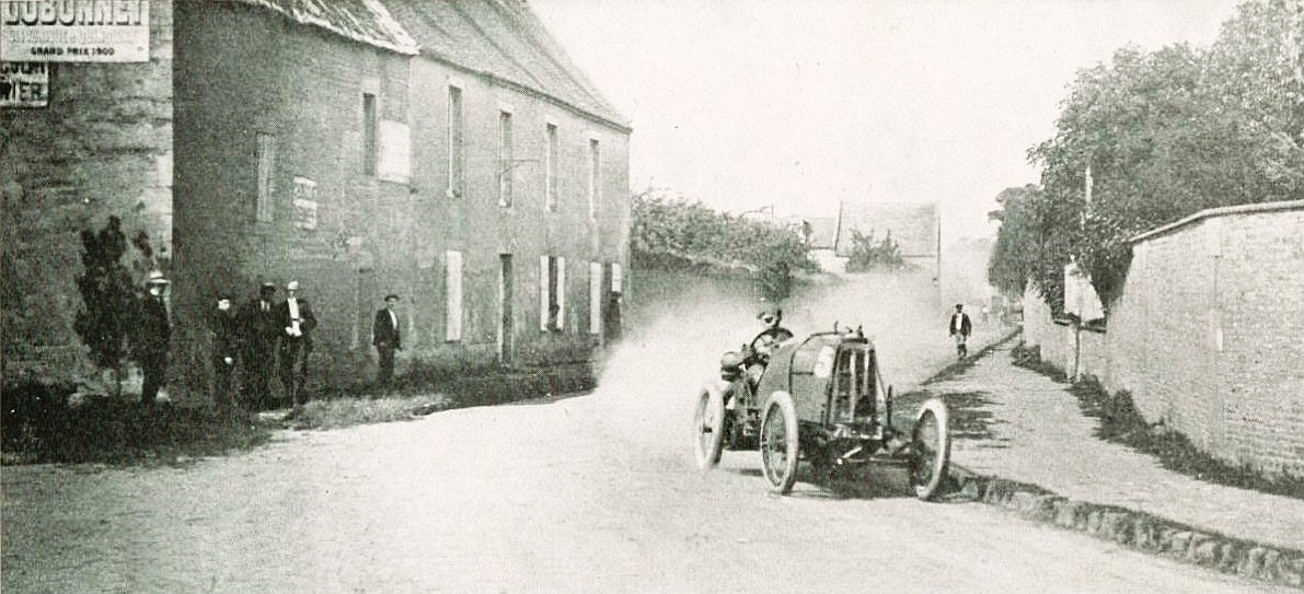 Georges Boillot vainqueur de la Coupe de Normandie 1909, sur voiturette Peugeot - La Vie au Grand Air, 11 septembre 1909, p.200